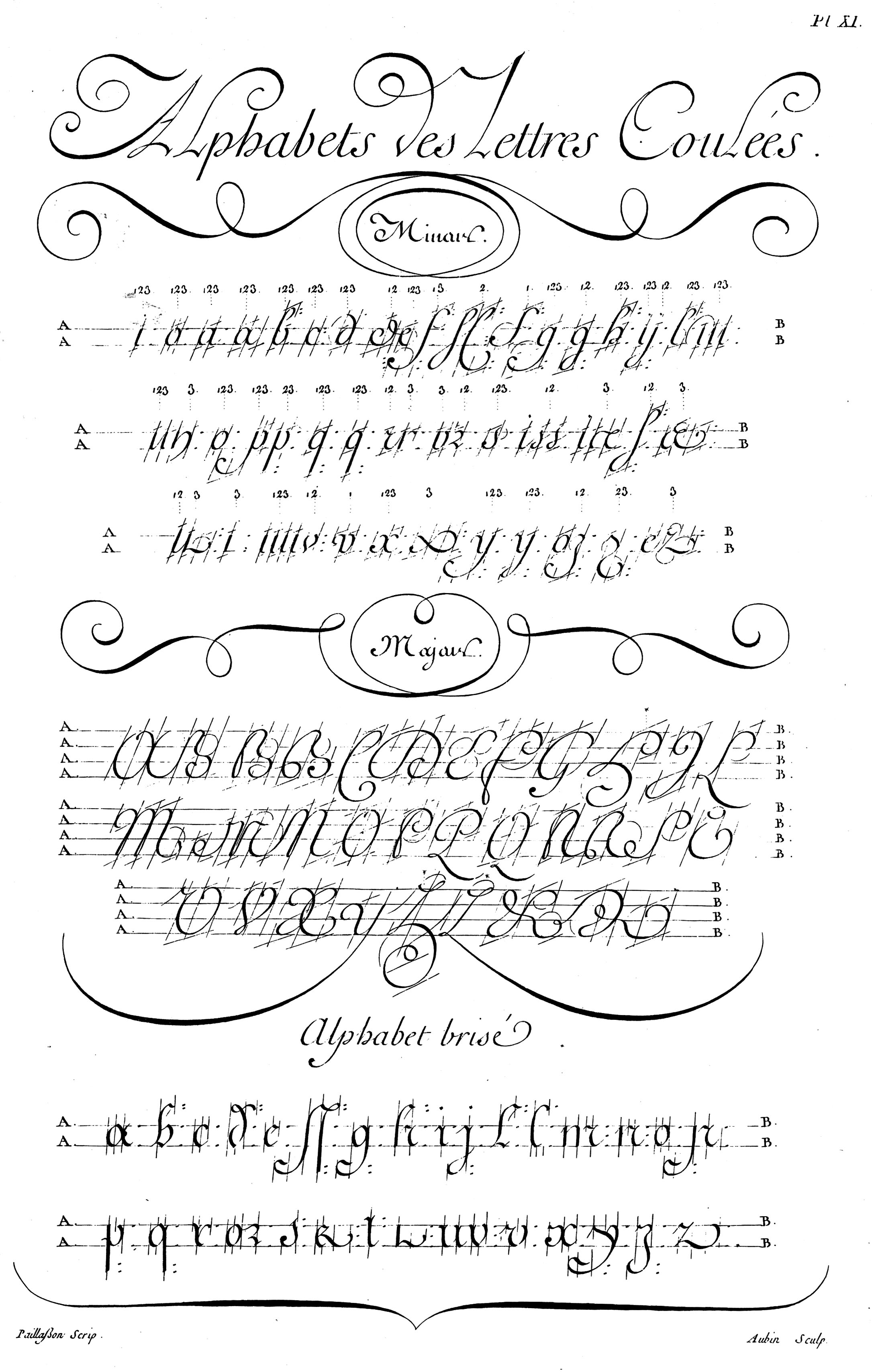 Spécimen d’écriture coulée, planche de l’Encyclopédie de Diderot et d'Alembert